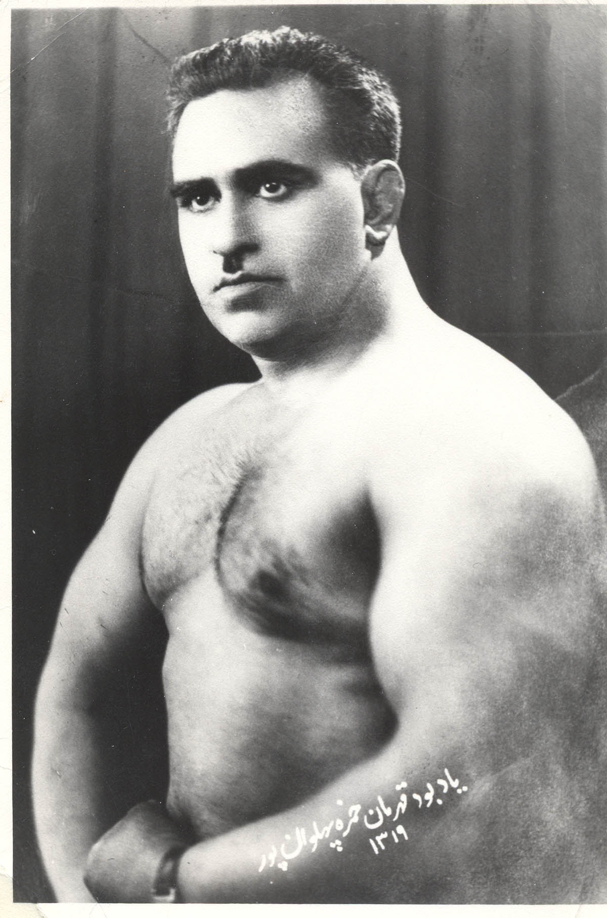 این عکس توسط پهلوان اول تهران حمزه پهلوان پور به عنوان کارت پستال هدیه می شده است